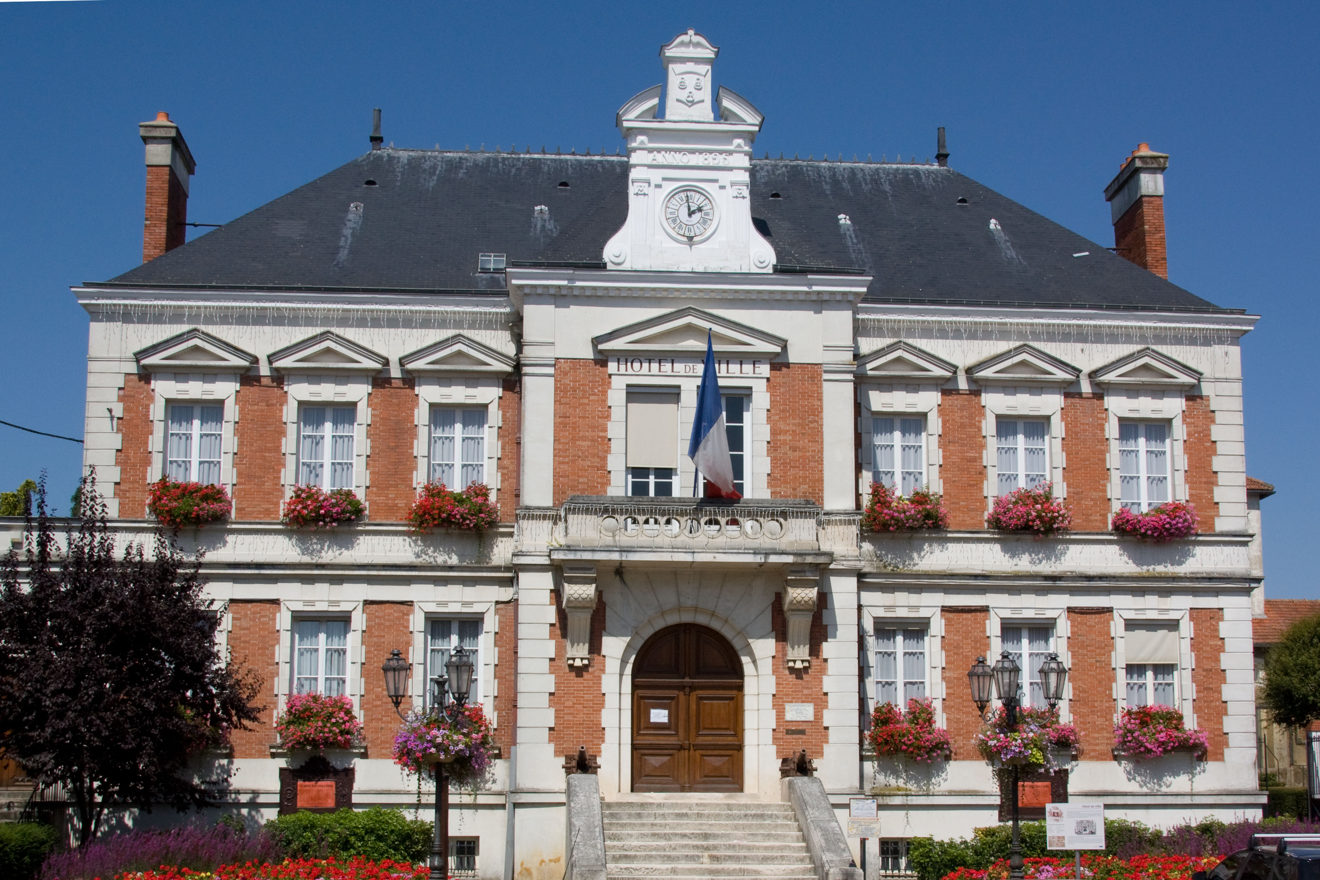 L'Hôtel de ville de Milly-la-Forêt, Milly-la-Forêt, Essonne, France